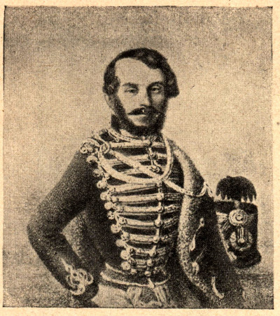 Karol Gustaw D'Abancourt de Franqueville lengyel nemes, katona, az 1848-49-es magyar forradalom és szabadságharc századosa. Fáy Zoltán, a cikk szerzője szerint a kép a századfordulón jelent meg az Új idők c. újság egyik számában.